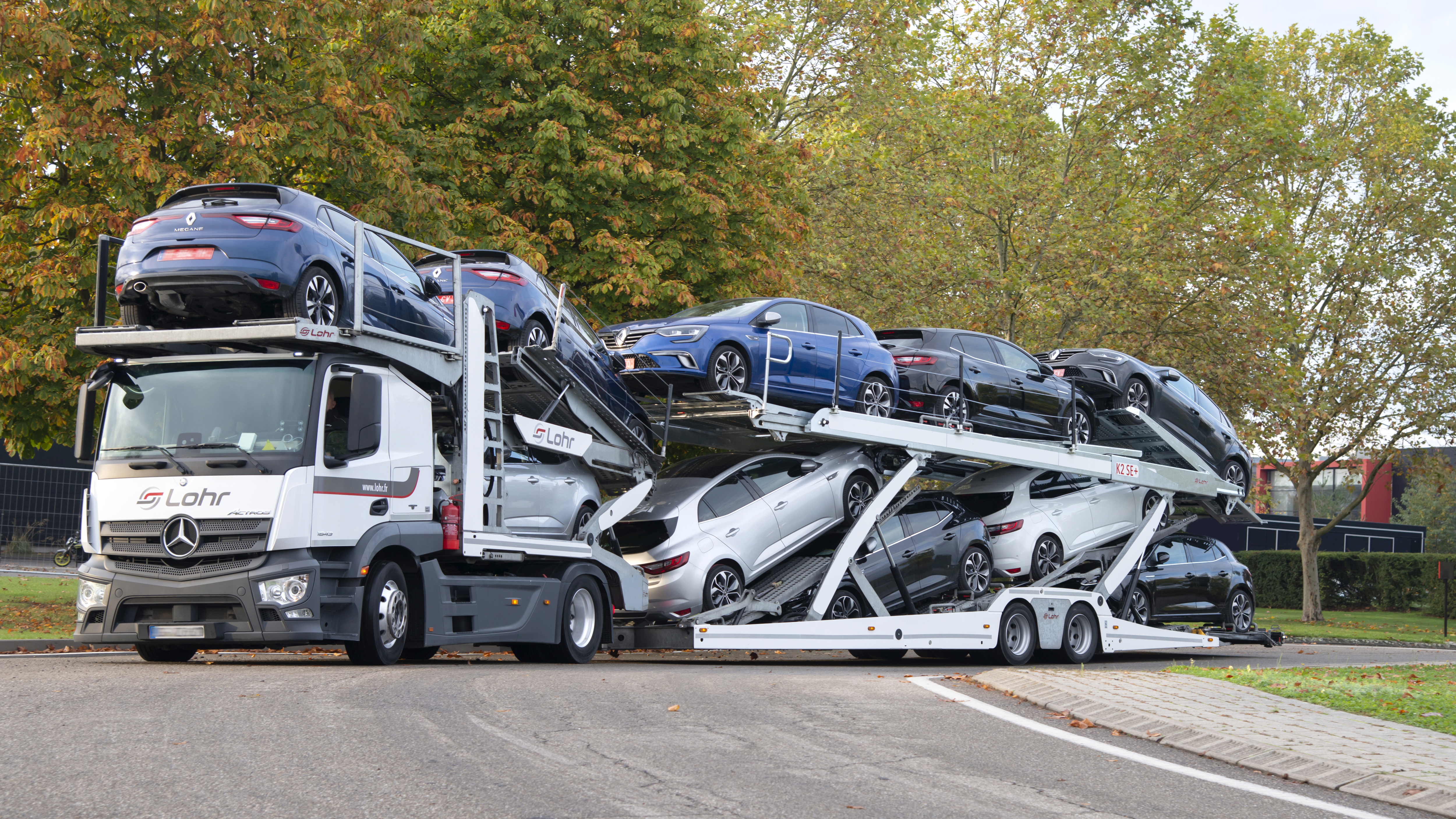 remorque porte-voitures LOHR avec camion.